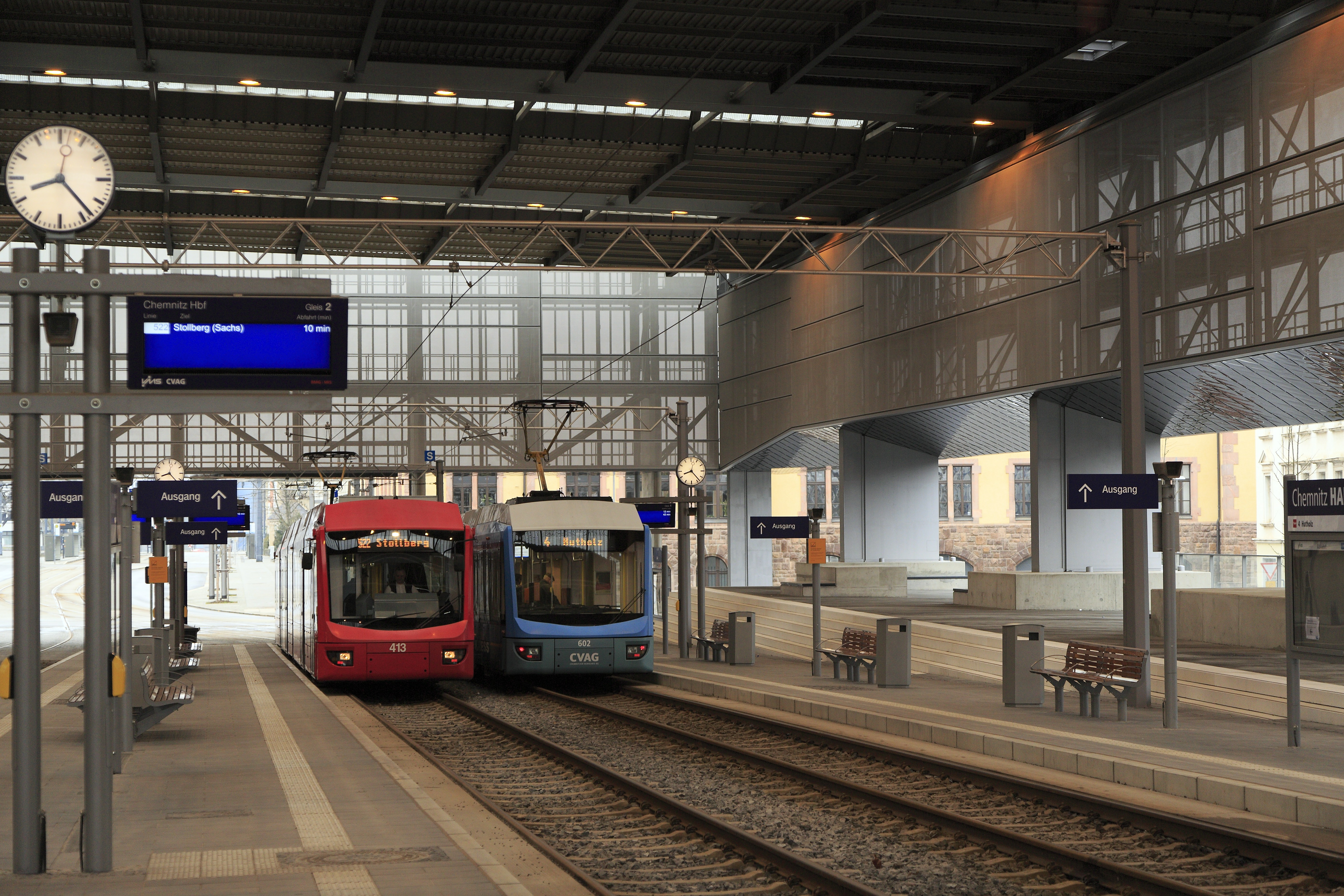 Straßenbahnbahnsteige in der Bahnsteighalle etwa in der Lage des ehemaligen Kopfgleises 3. Aus topografischen Gründen liegen die Bahnsteige in der Neigung. Links daneben die derzeit noch nicht genutzten Übergangsgleise zur Fernbahn.